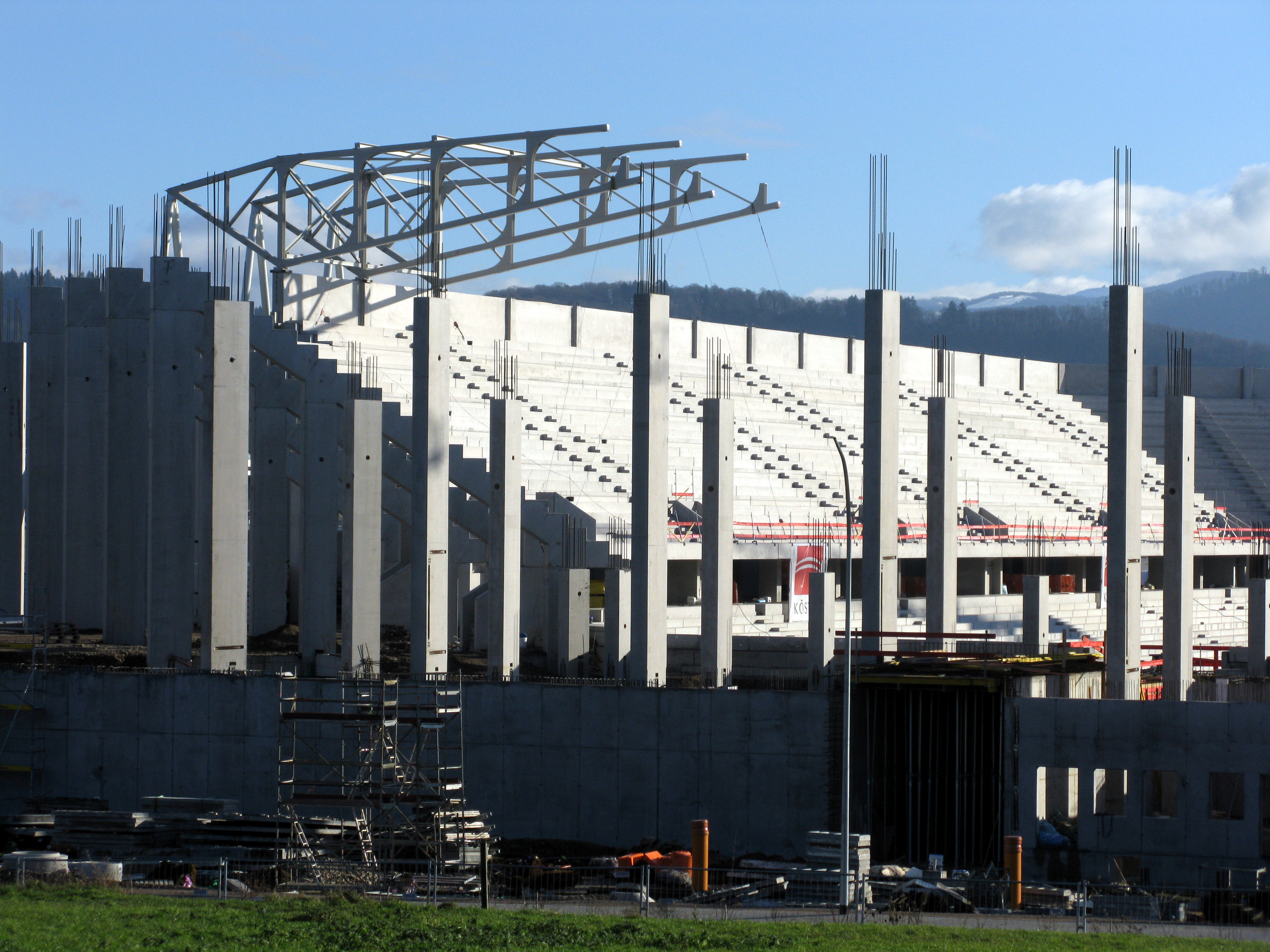 Bau eines neuen Fußballstadions für den Freiburger Sport-Club